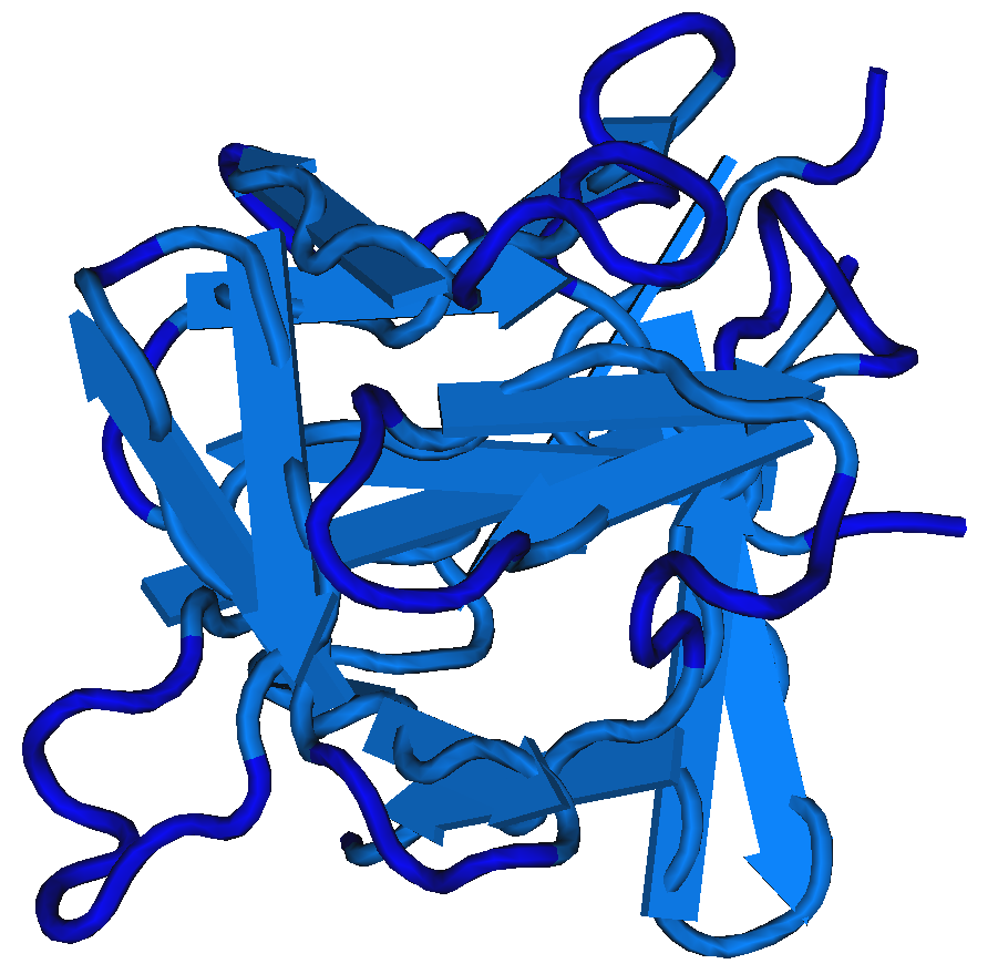 2ILA Interleukin 1 Alpha